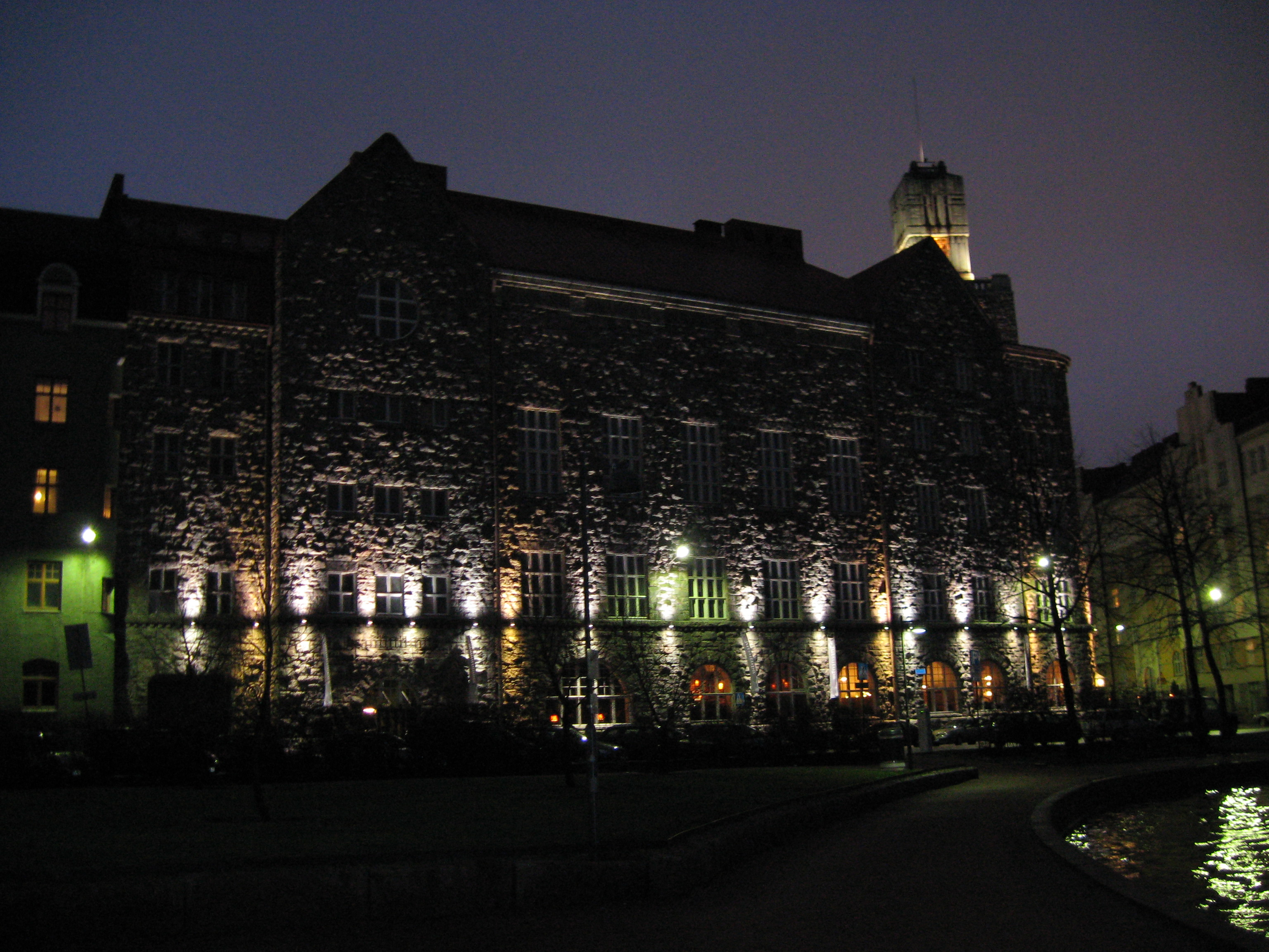 Helsingin työväentalo yöllä